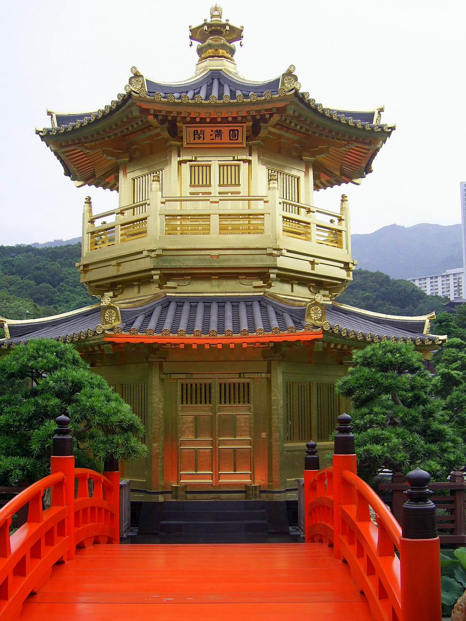 圓滿閣